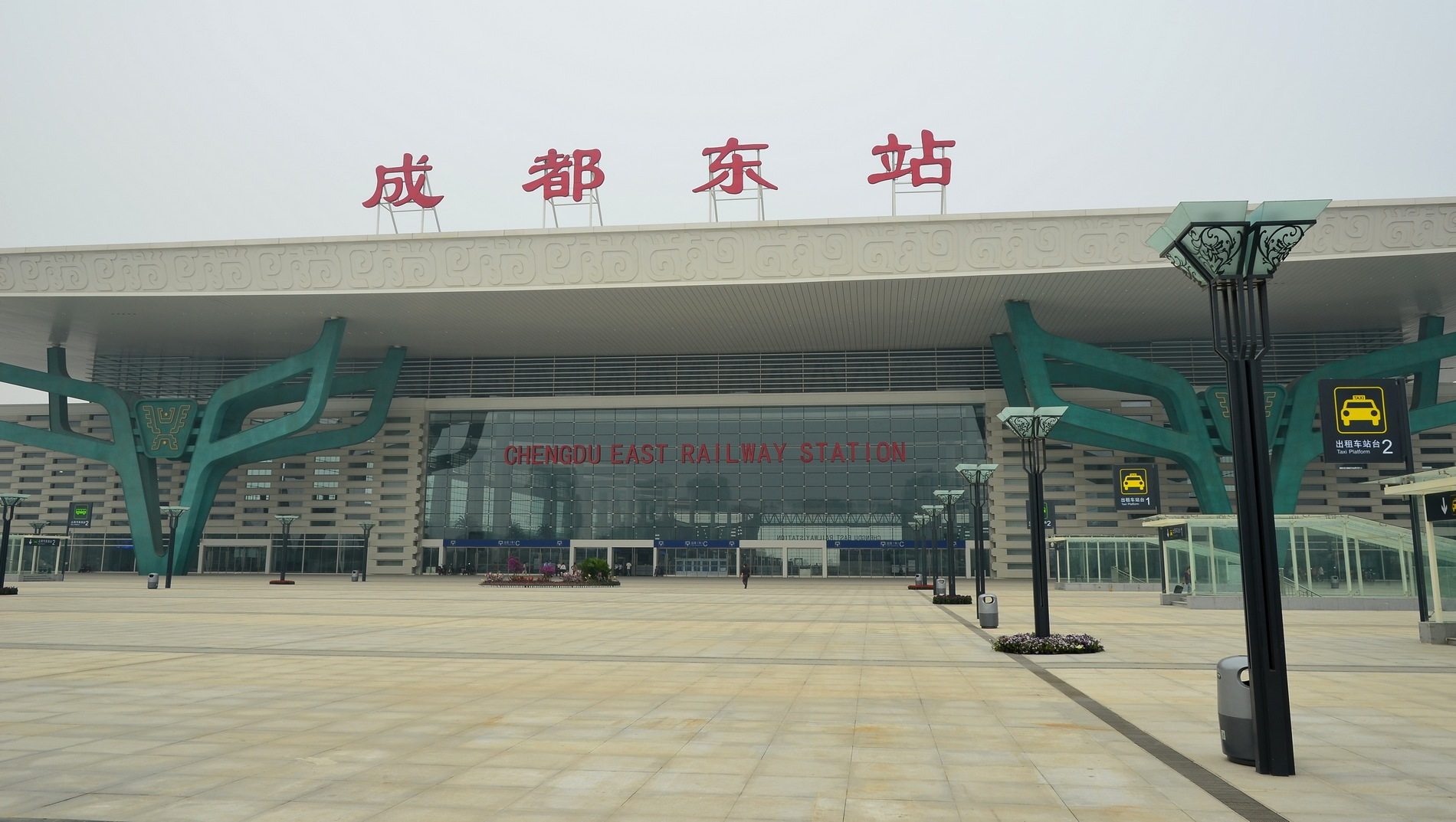 成都东站 东广场